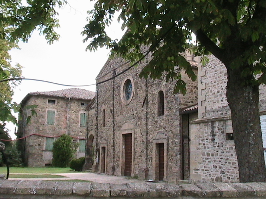 Bazzano (Neviano degli Arduini) - Pieve romanica di Sant'Ambrogio